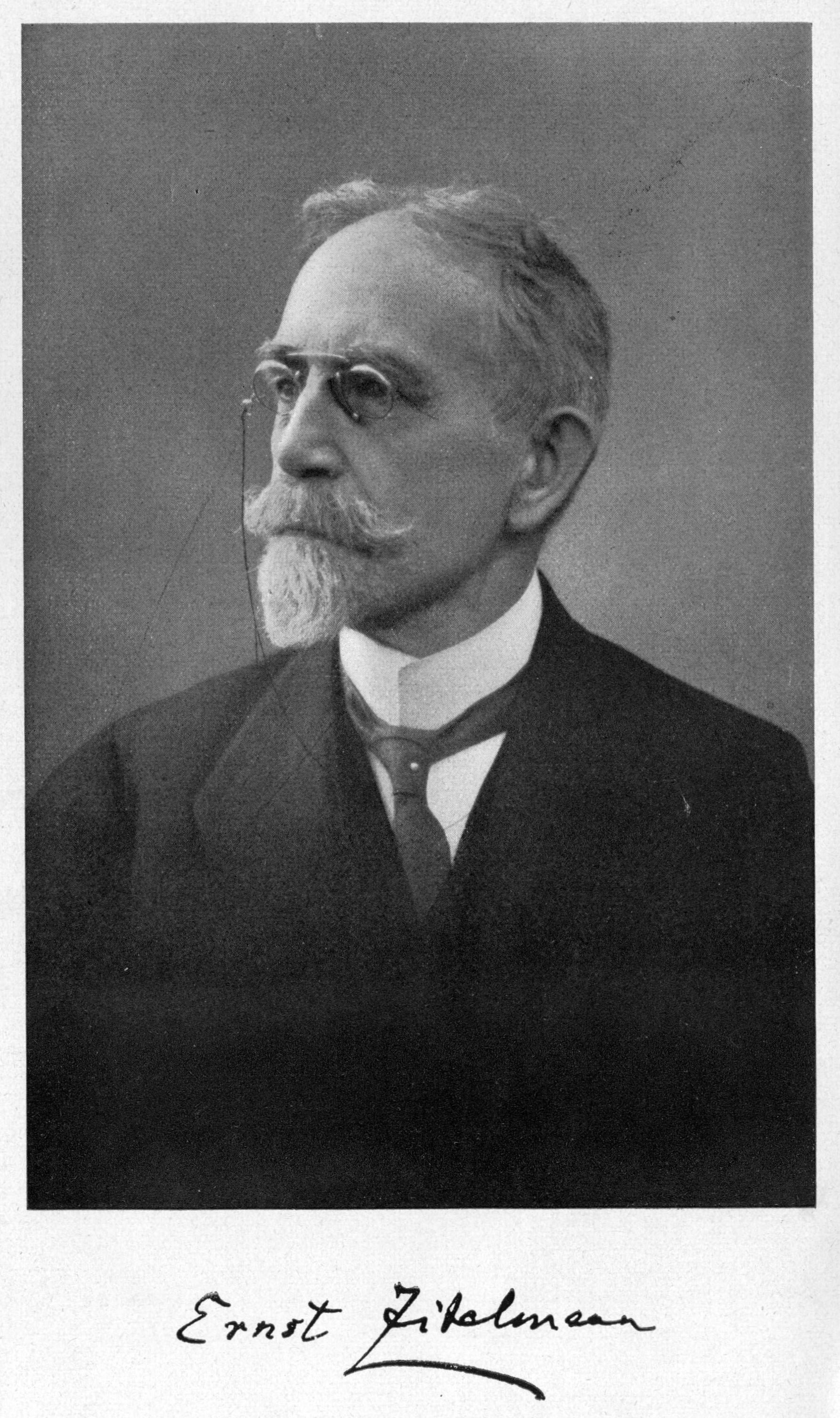 Porträt Ernst Zitelmann